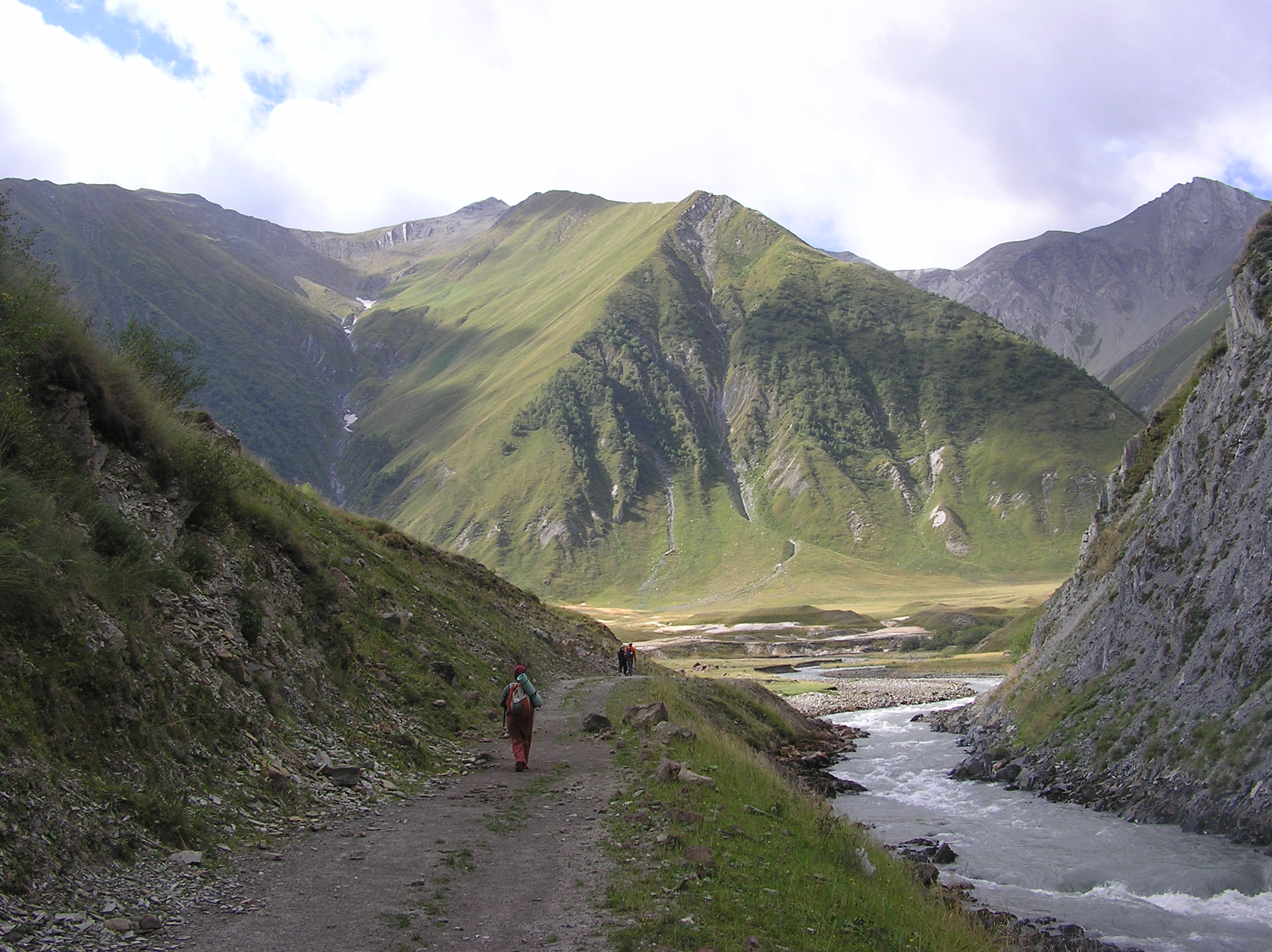 עמק טרוסו ליד הגבול בין גאורגיה לדרום אוסטיה. העמק נמשך עד שהוא מתחבר לדרך הצבאית הגאורגית